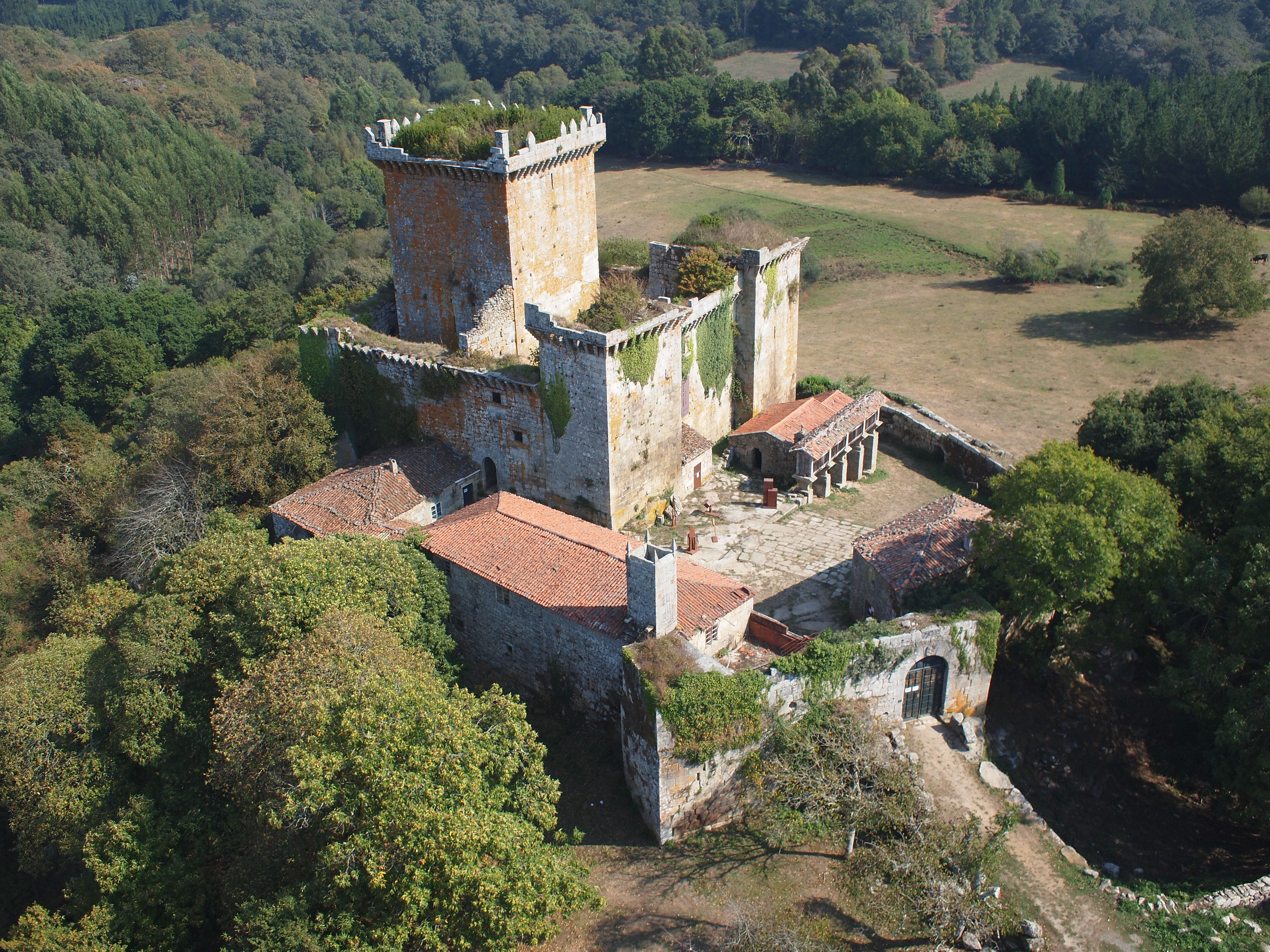 Vista aérea del castillo de PambreGalego: Vista aérea do castelo de Pambre